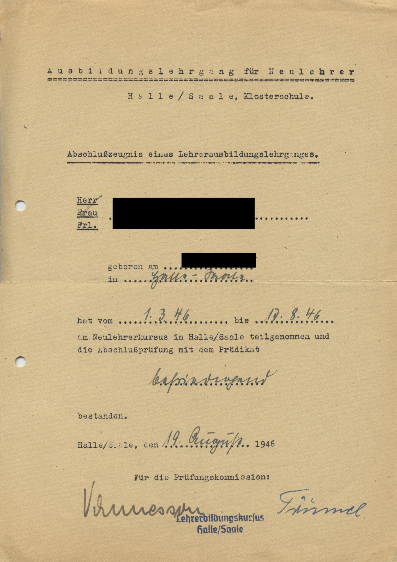 Abschlusszeugnis nach Neulehrer-Ausbildung in der DDR